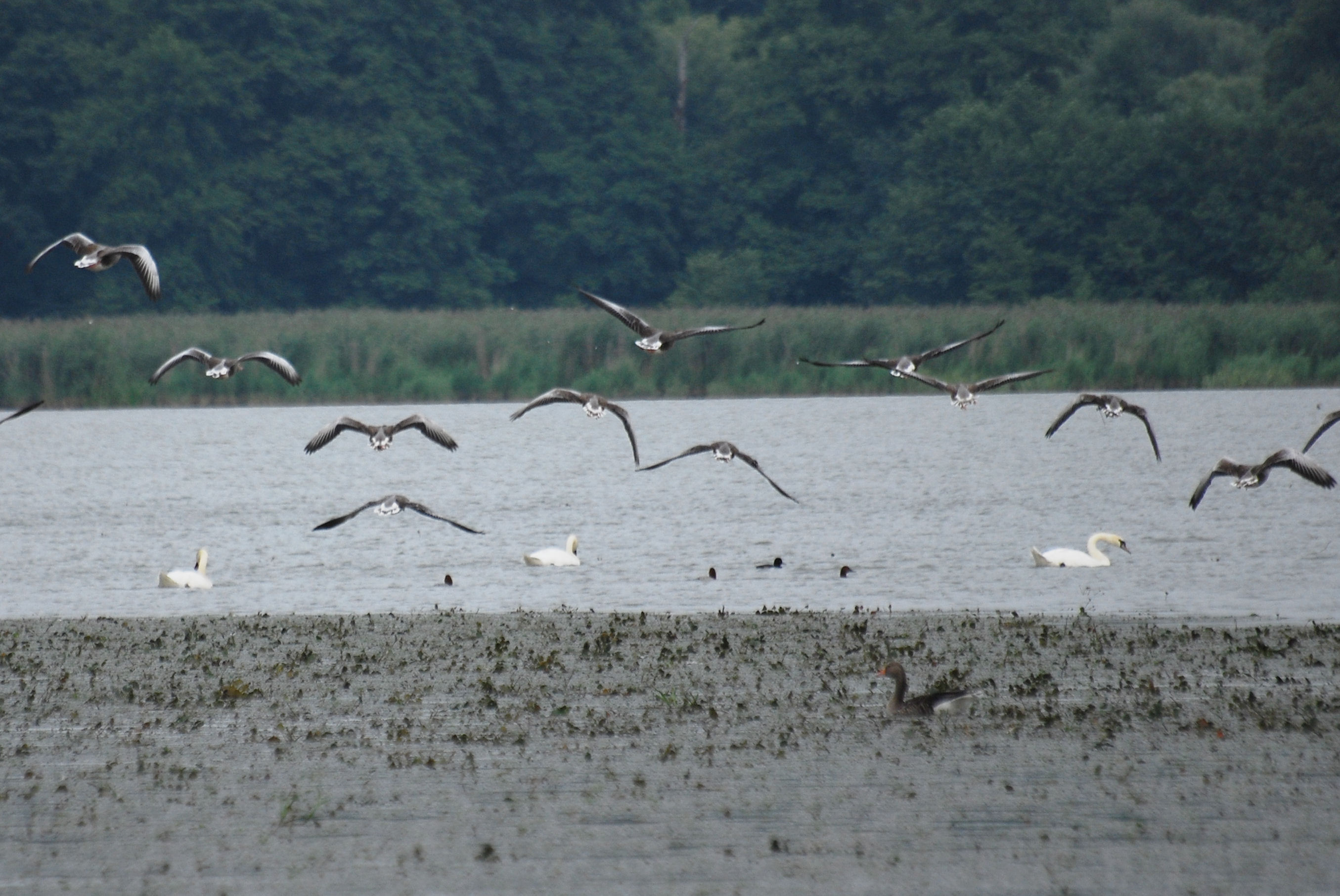 Rezerwat przyrody Łężczok w powiecie raciborskim